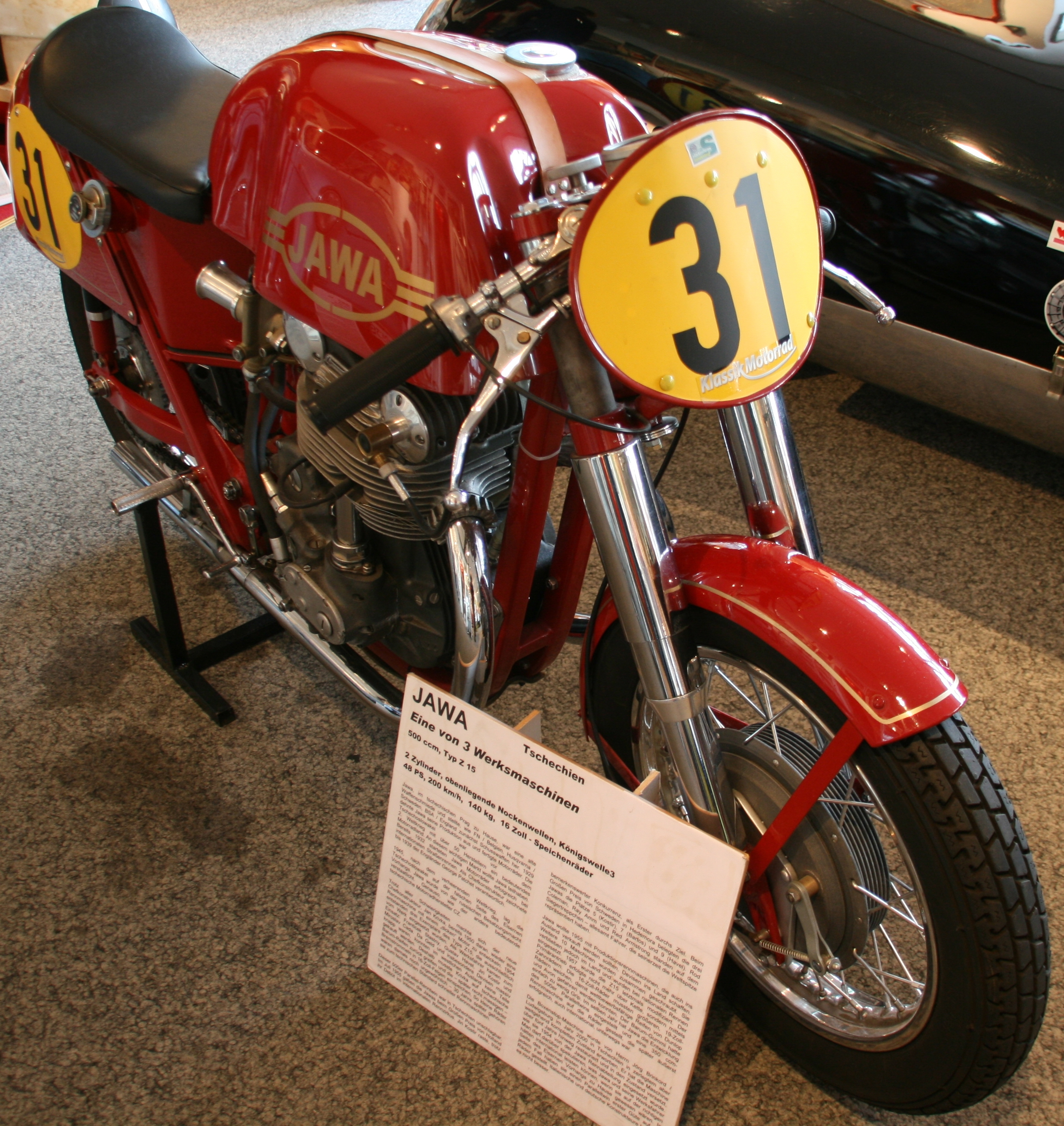 Jawa Z 15 im Boxenstop Tübingen